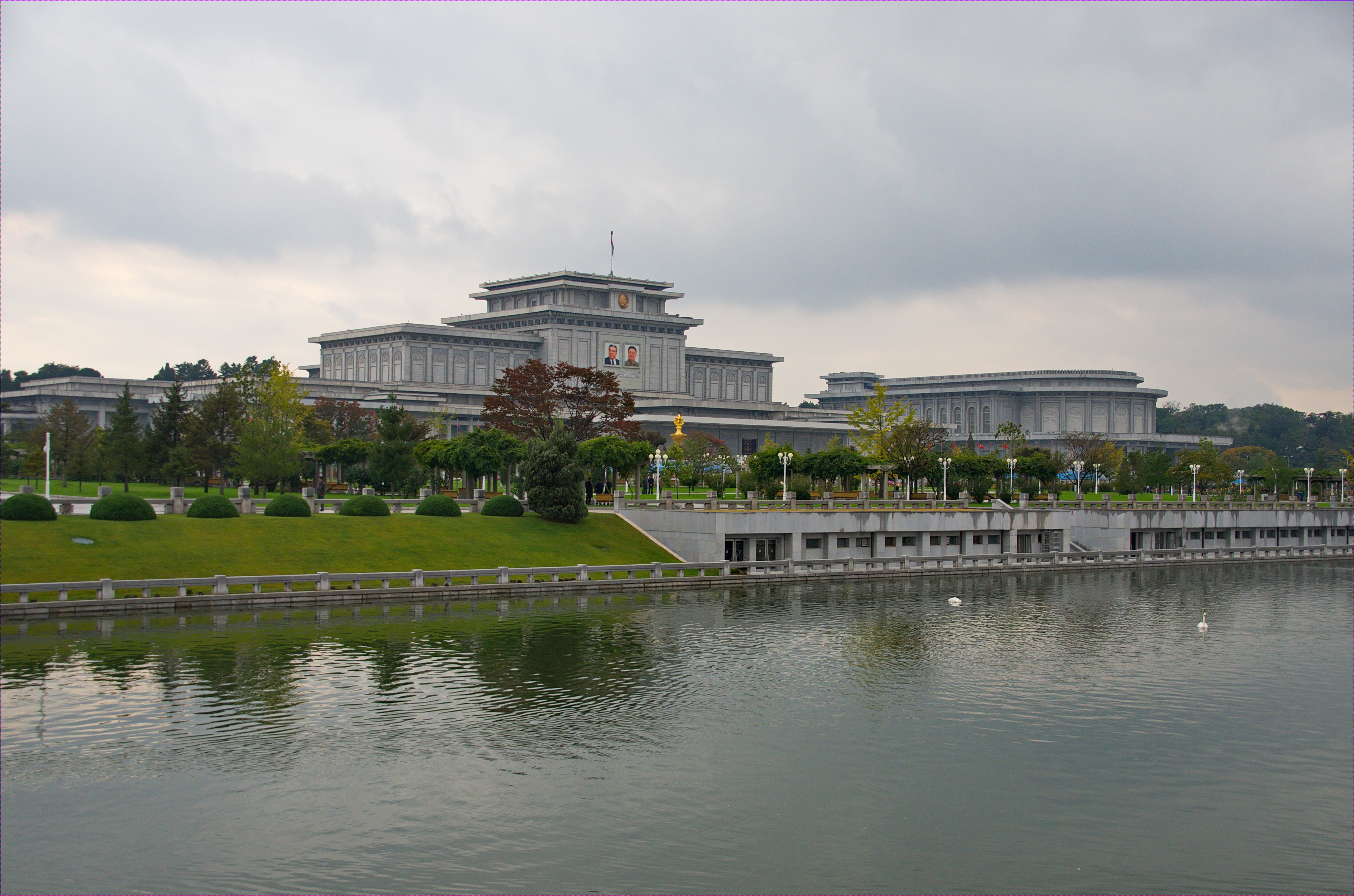 Nordkorea 2015 - Pjöngjang - Mausoleum